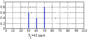 Рис2